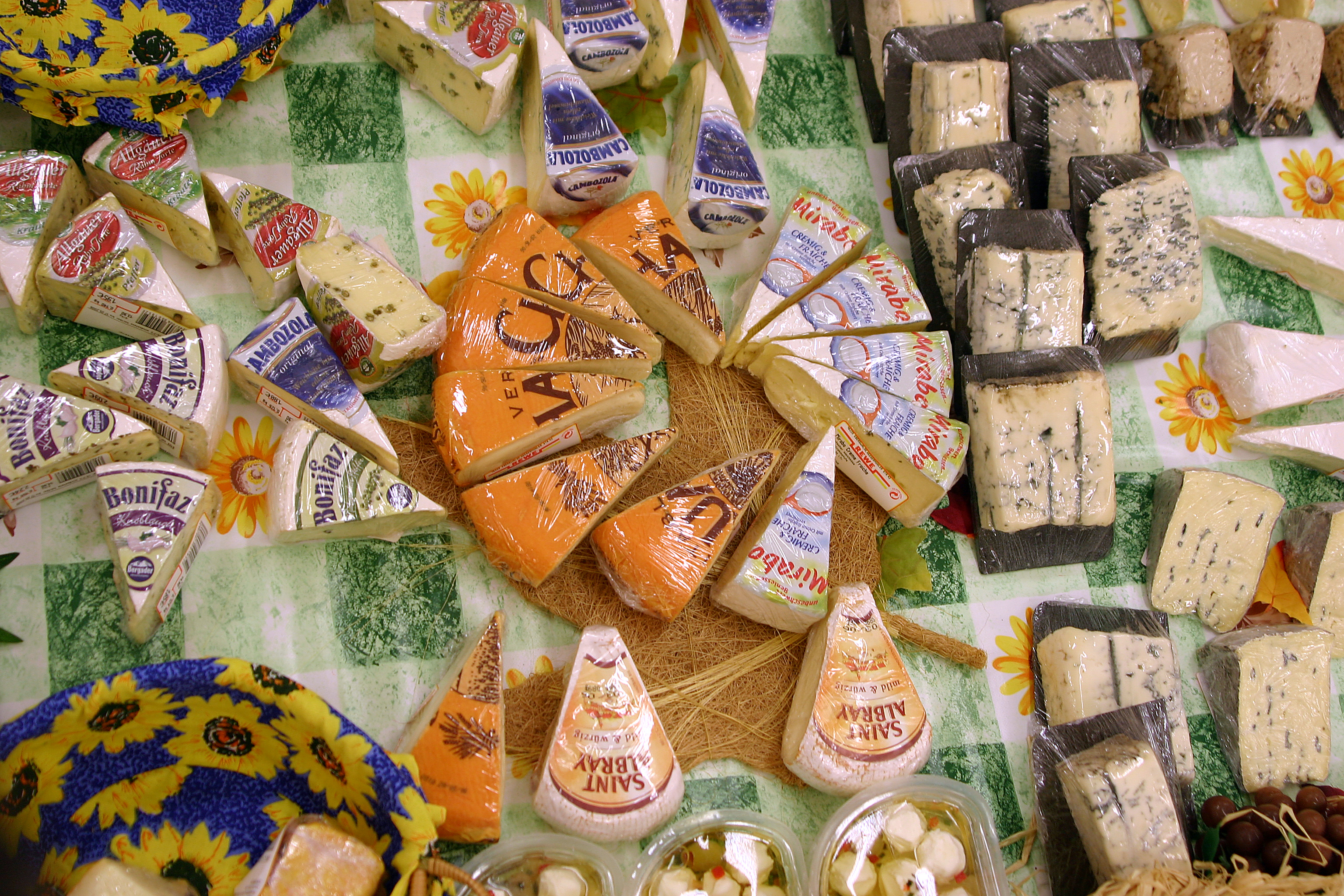 Bilder im Supermarkt REWE